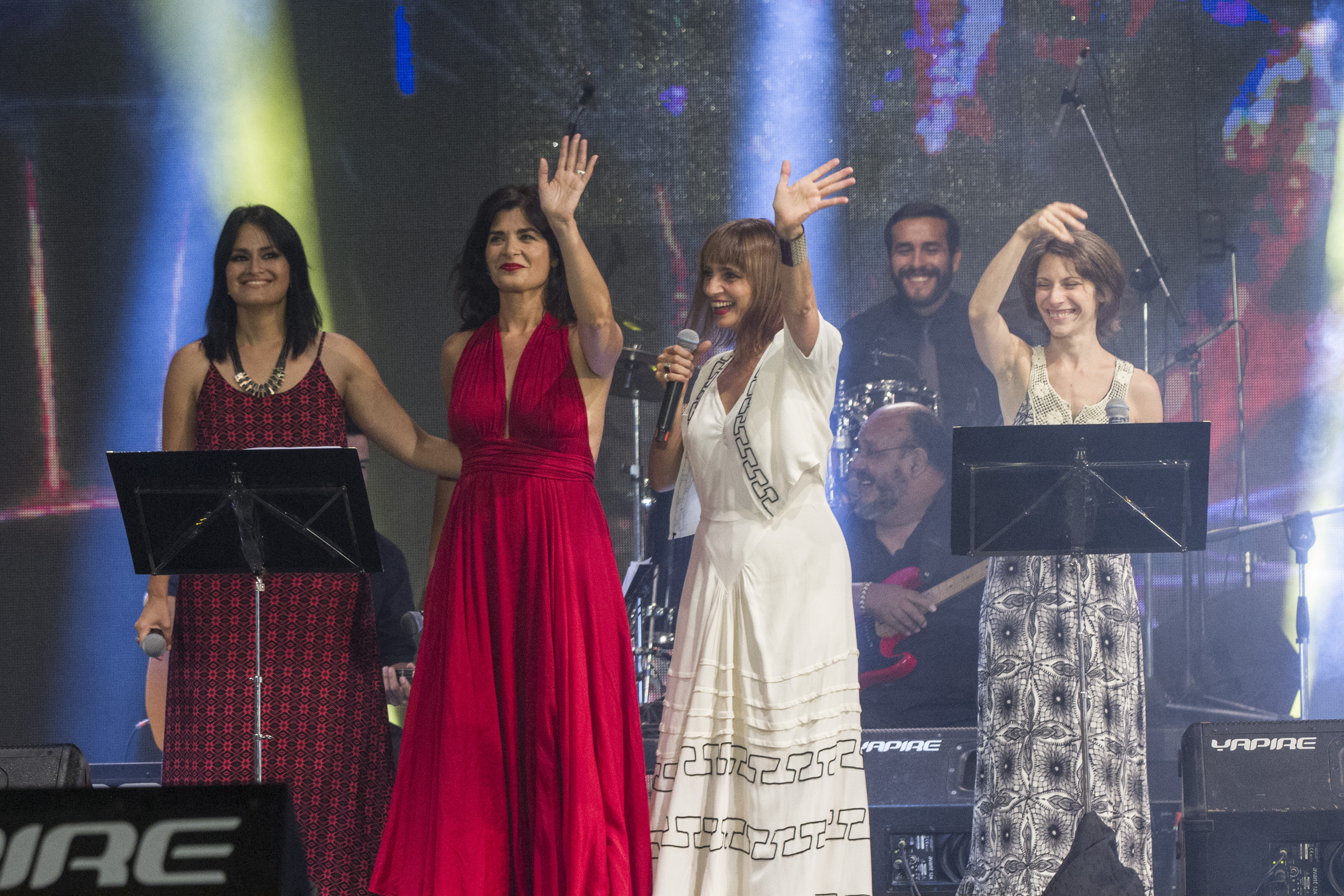 Corrientes, 26 de Enero de 2017 Elena Rogers, Soledad Villamil, Hilda Lizarazu, Valeria Gomez participaron de la 27 Fiesta Nacional del Chamamé en la ciudad de Corrientes. Juntas le dieron al chamamé un toque femenino en "Chamame Mujer" . Foto:Silvina Frydlewsky / Ministerio de Cultura de la Nación